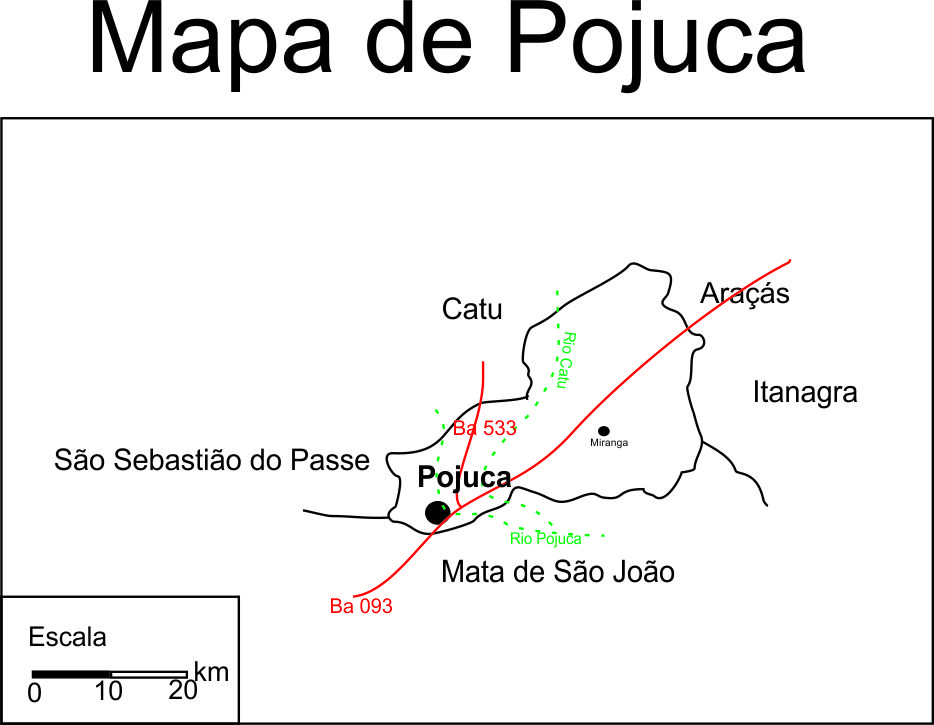 Mapa de Pojuca